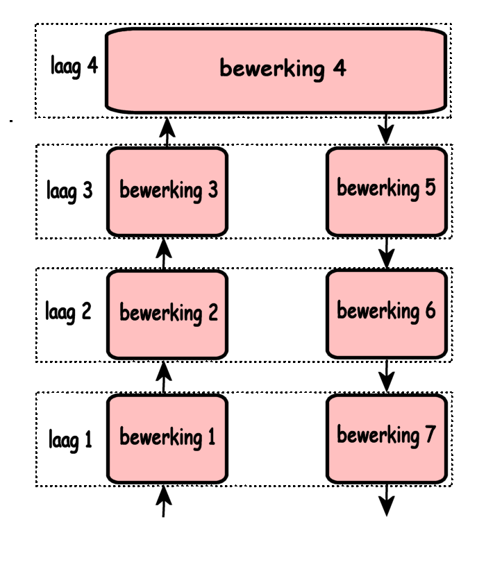 splitsing in digitaal domein